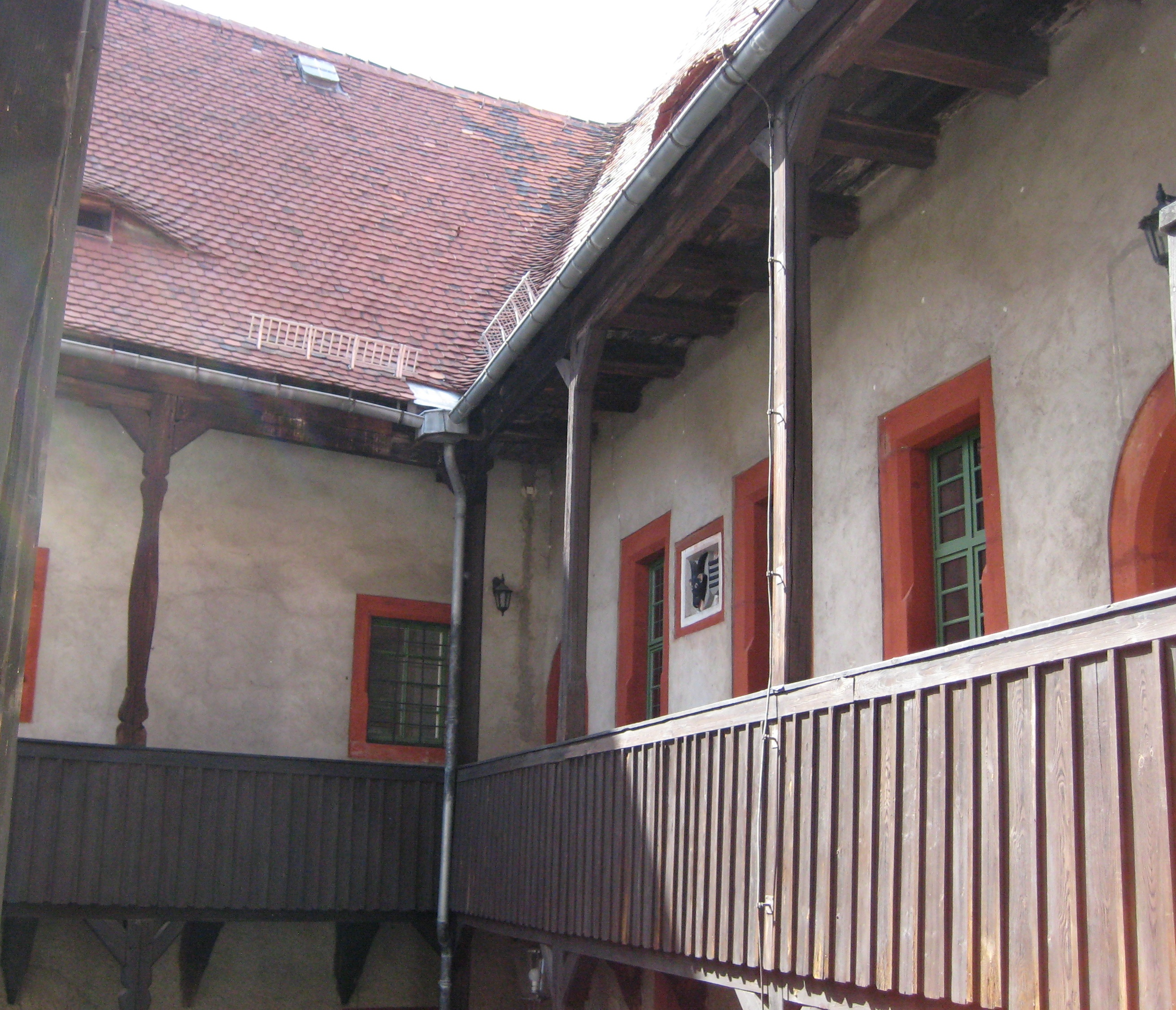 Burghof der Burg Schönfels in Schönfels (Lichtentanne), Freistaat Sachsen.